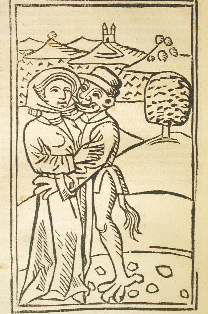 Holzschnitt 5: "Teufelsbuhlschaft": Verführung durch den Teufel.